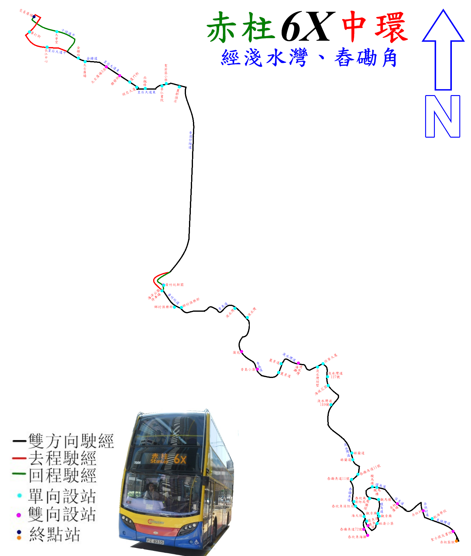 中文（香港）: 城巴6X線的走線圖